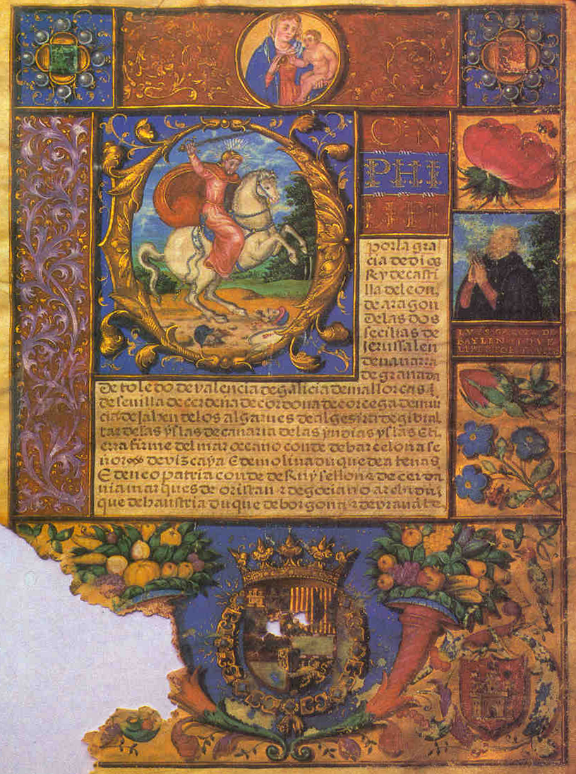 Carta de Privilegio Real de Pegalajar. Otorgada por Felipe II en Valladolid, el 3 de junio de 1559. Libro con hojas de pergamino, ilustrado a mano. Dimensiones de la encuadernación: 348 x 242 x 60 mm, y del cuerpo del libro: 346 x 238 mm. Firmado por la princesa Juana de Austria y suscrito por el secretario del rey Felipe II. En el reverso de la segunda página, aparece la leyenda "LVIS GARCIA DE BAYLEN EL QUE LIBERTO ESTA VILLA".[1]